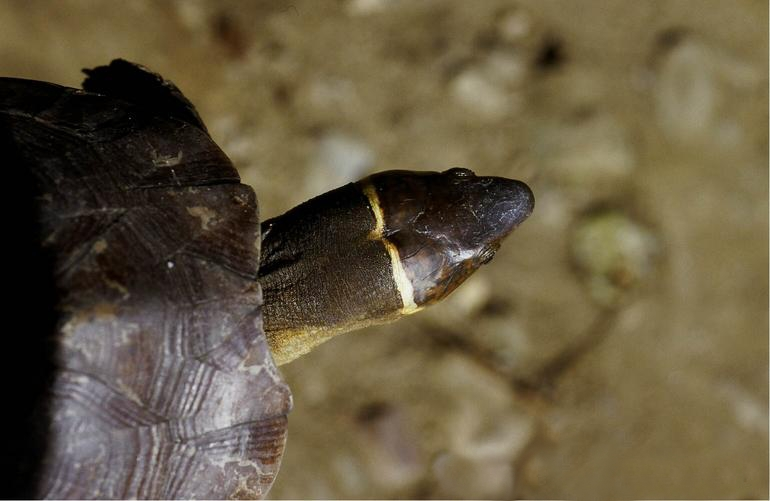 Heosemys leytensis